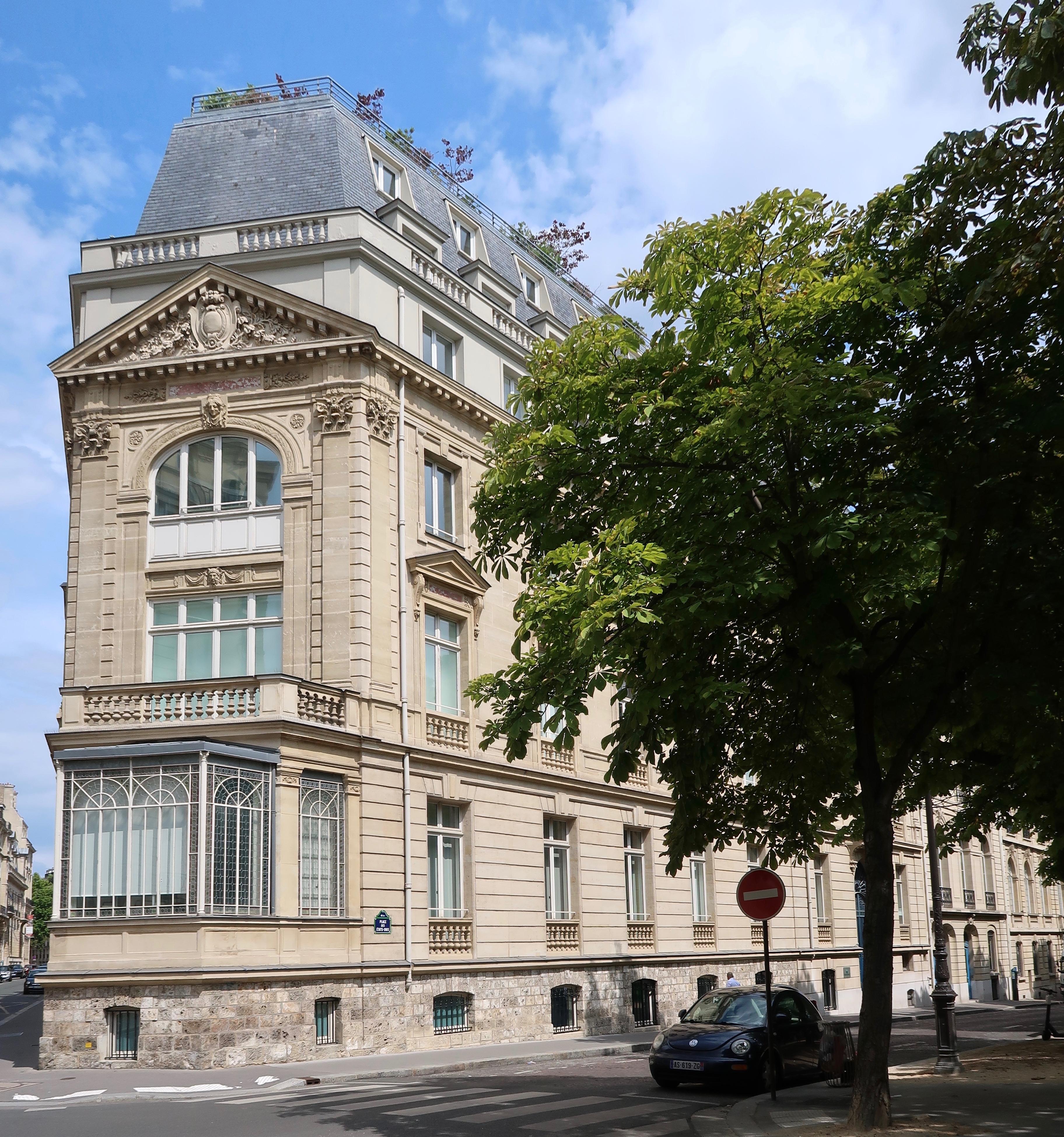 12 place des États-Unis, au coin de la rue Galilée (Paris, 16e).